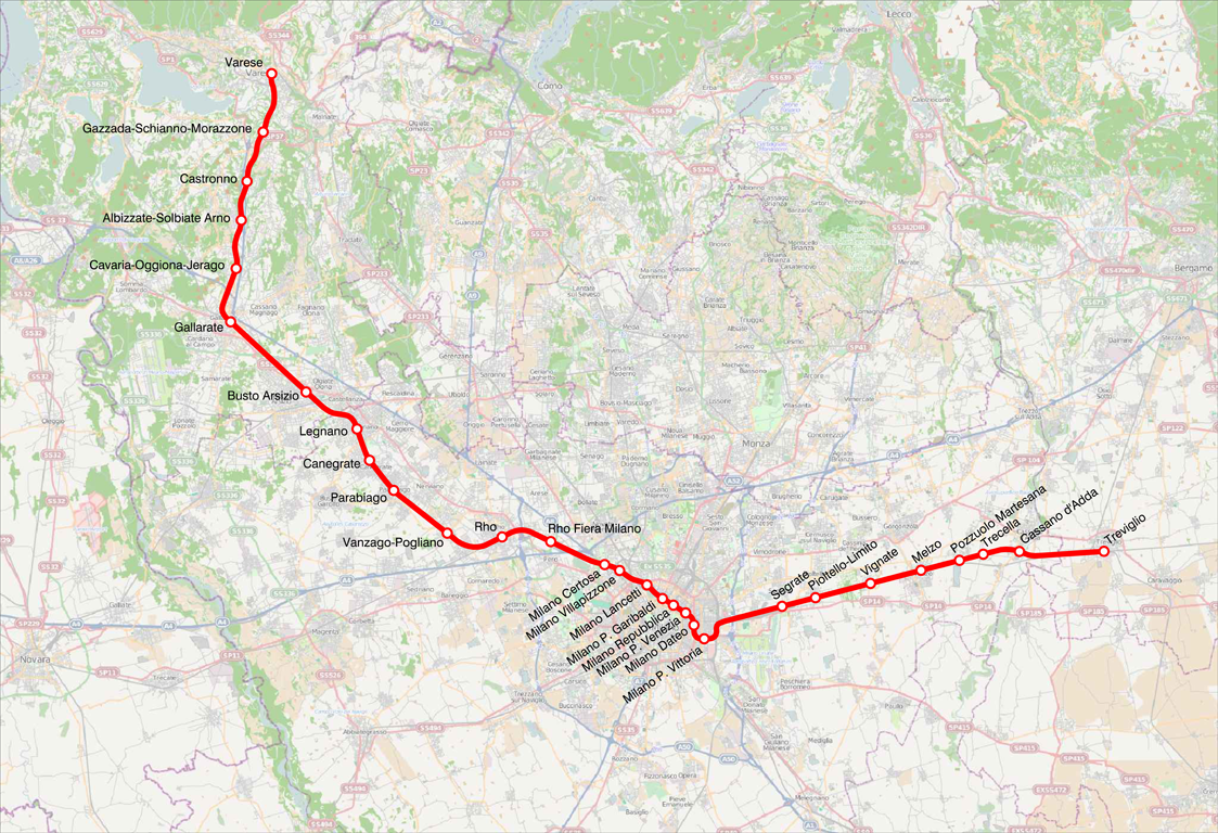 Mappa della linea S5 del servizio ferroviario suburbano di Milano.